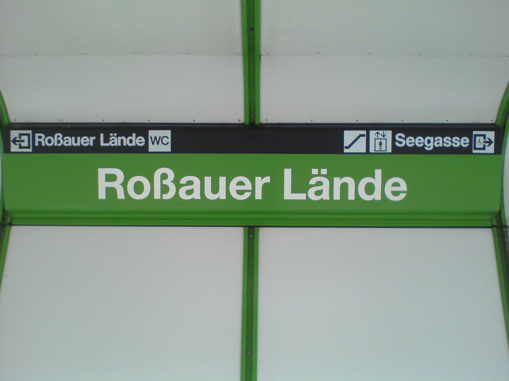 Stationsschild der Wiener U-Bahnlinie U4